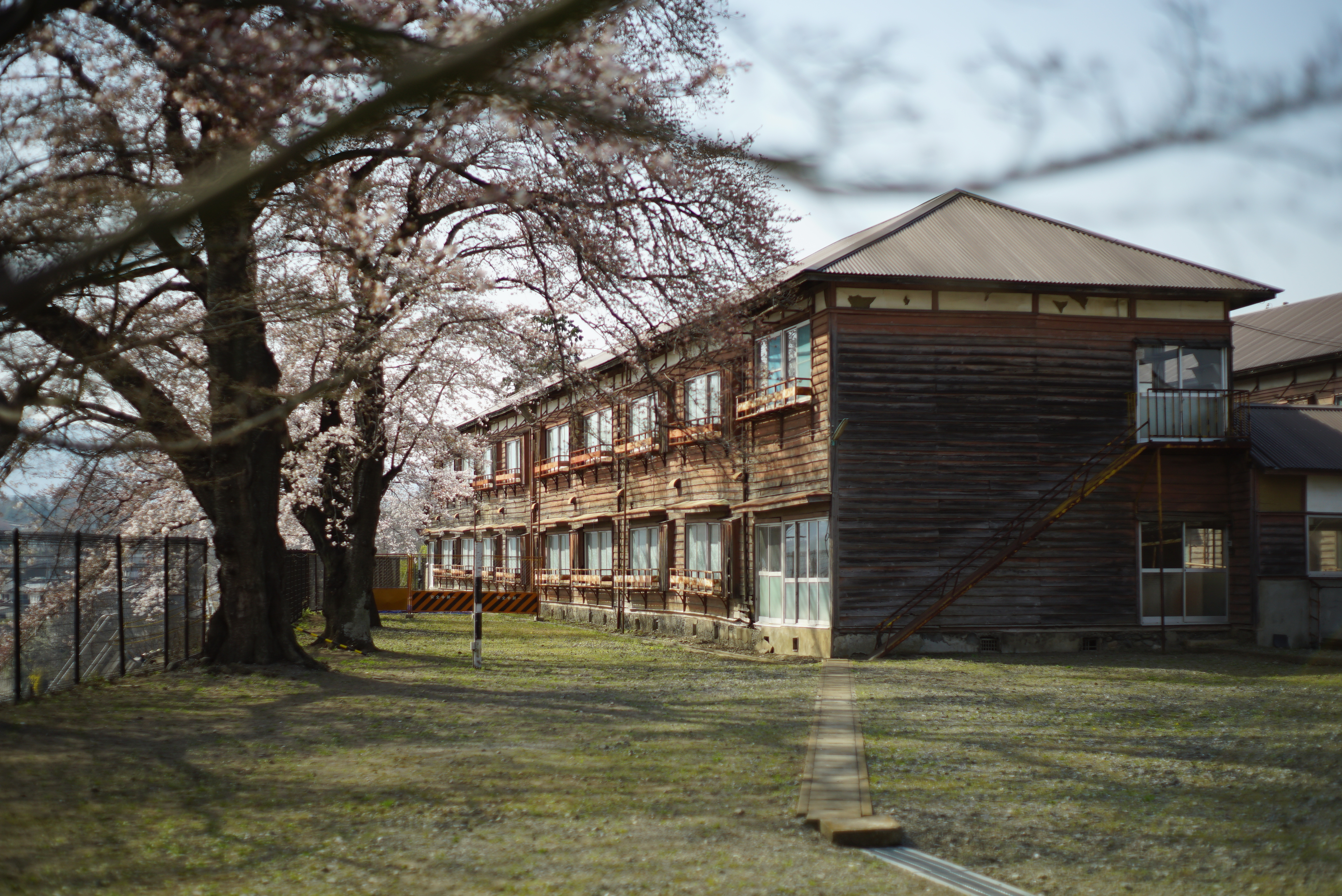 富岡製糸場 妙義寮